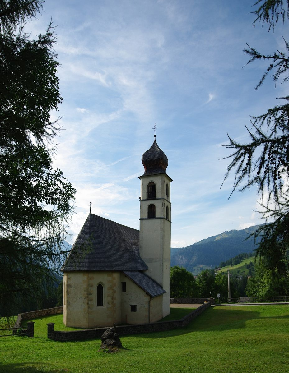 Chiesa di Santa Fosca, Val di Zoldo